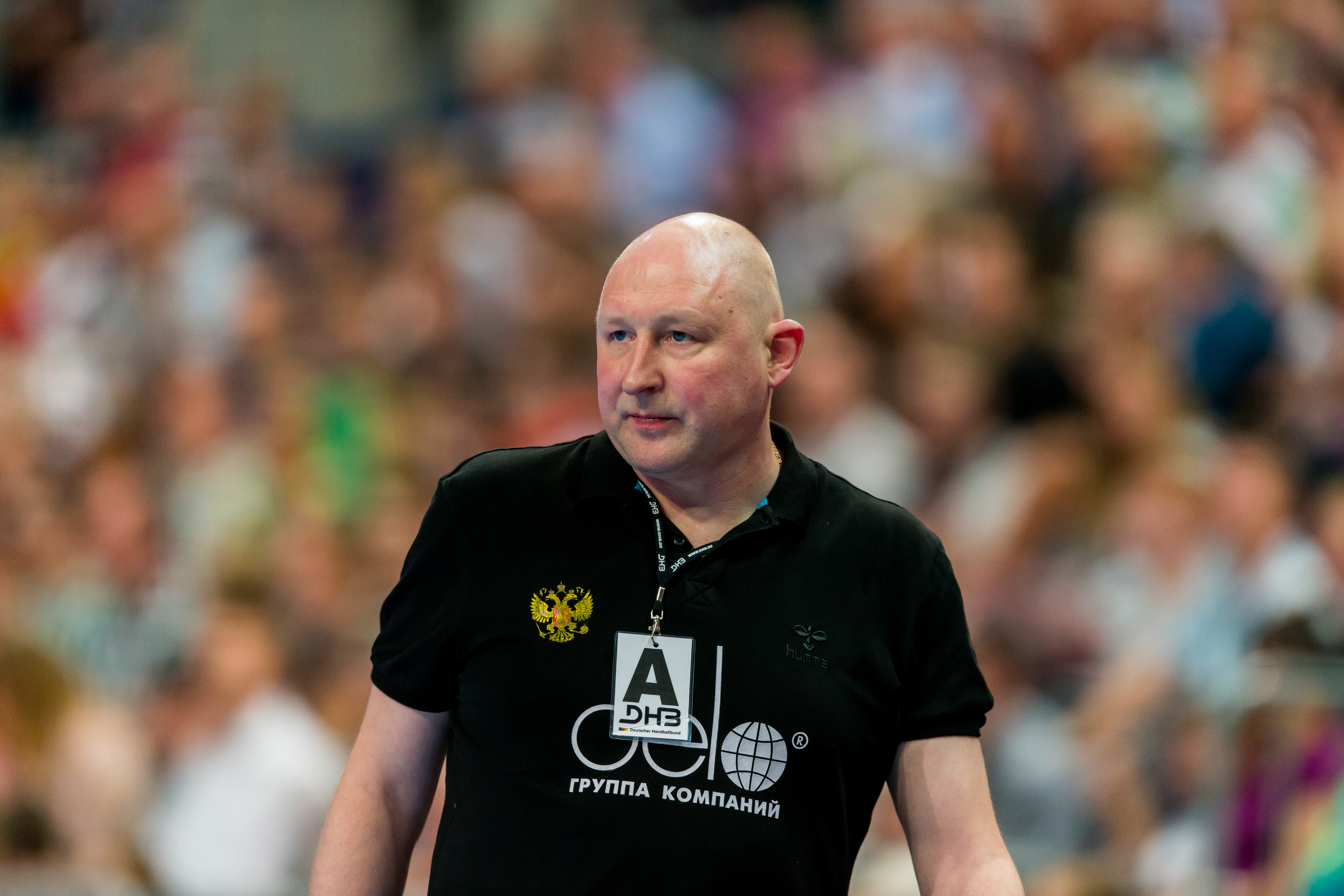 International Handball friendly match between Germany and Russia during Handball Deutschland vs Russland (25:27) at SAP Arena, Mannheim, Baden Württemberg, Germany on 2016-06-08, Photo: Sven Mandel